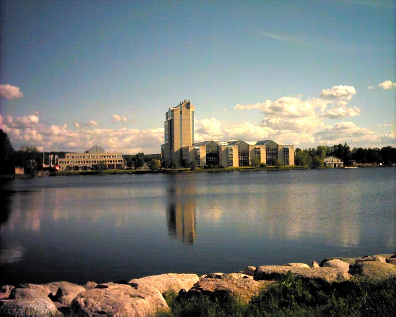 Klubbhusgatan 13, Jönköping, sett norrifrån, med Munksjön i förgrunden.